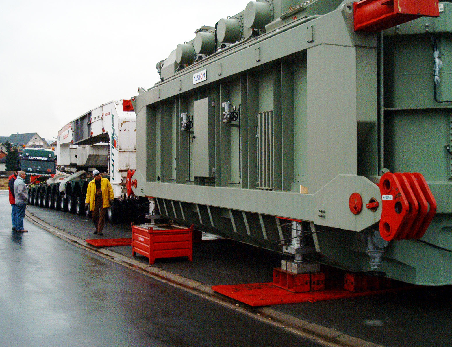 Zusammenstellen eines Schwertransports (Transformator eines Energieversorgers)